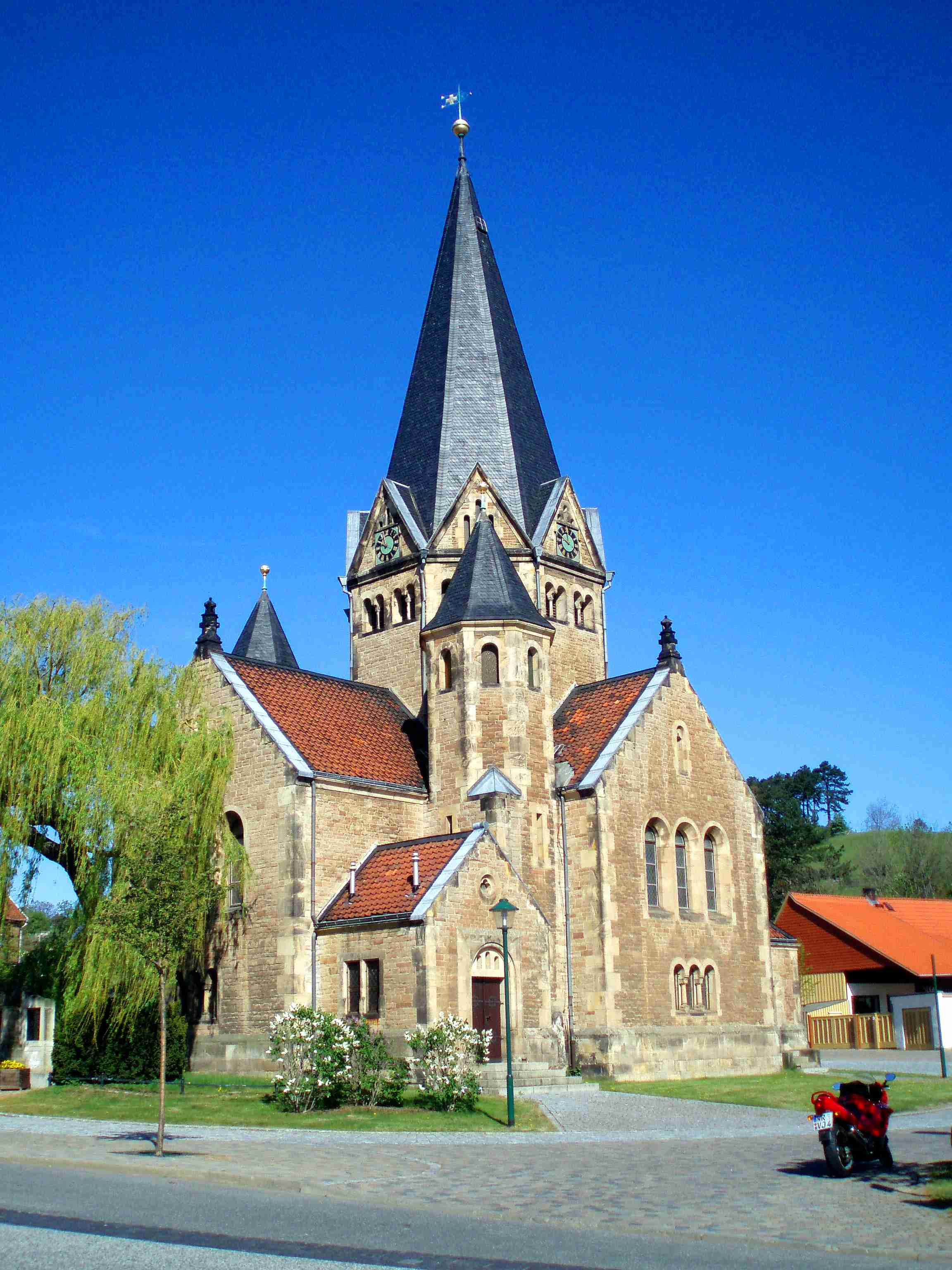 Kirche von Benzingerode